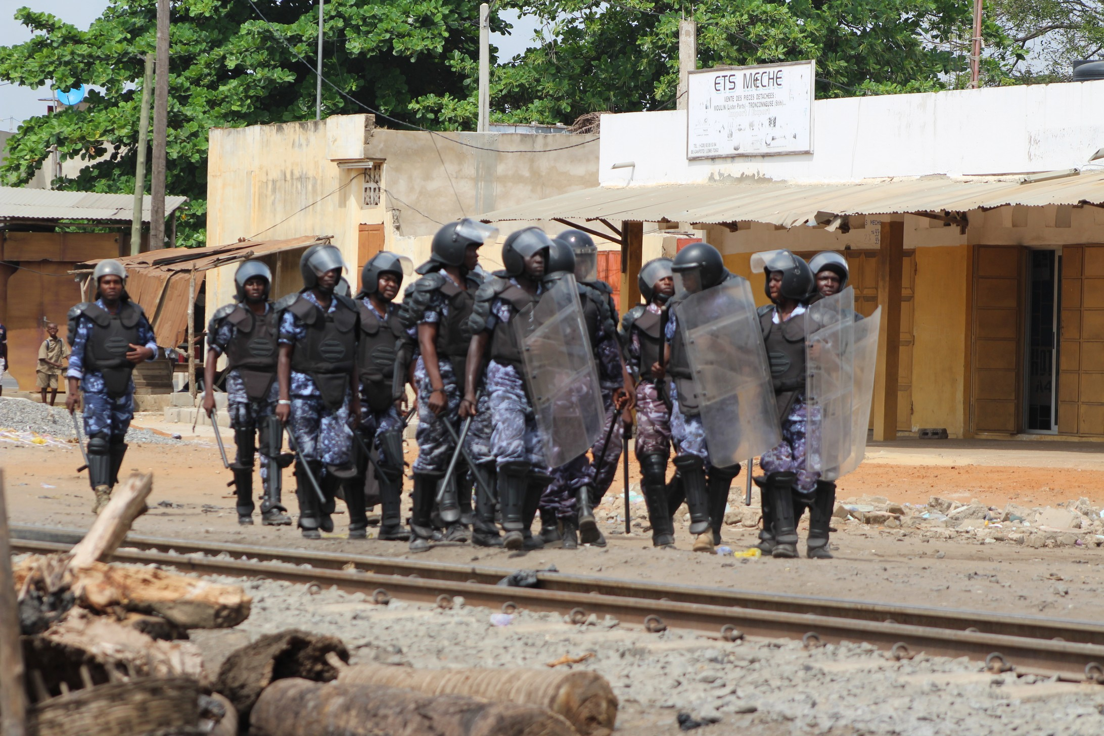 La police est est patrouille lors des manifestations dans les rues de Lomé, au Togo, le 18 octobre 2017. (VOA/Kayi Lawson)